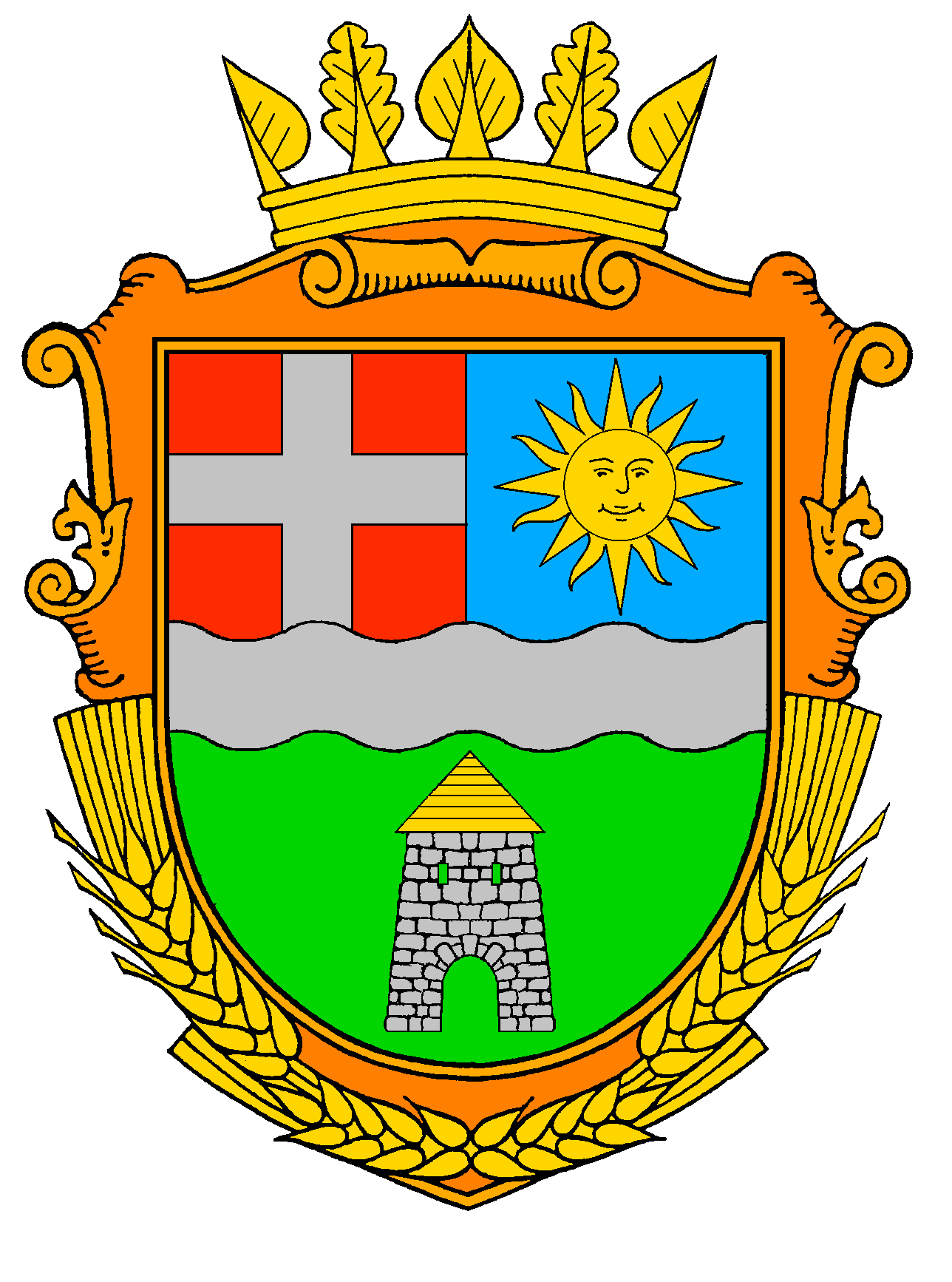 Герб Теофіпольського району (змінений варіант, затверджений 23 грудня 2011 року)